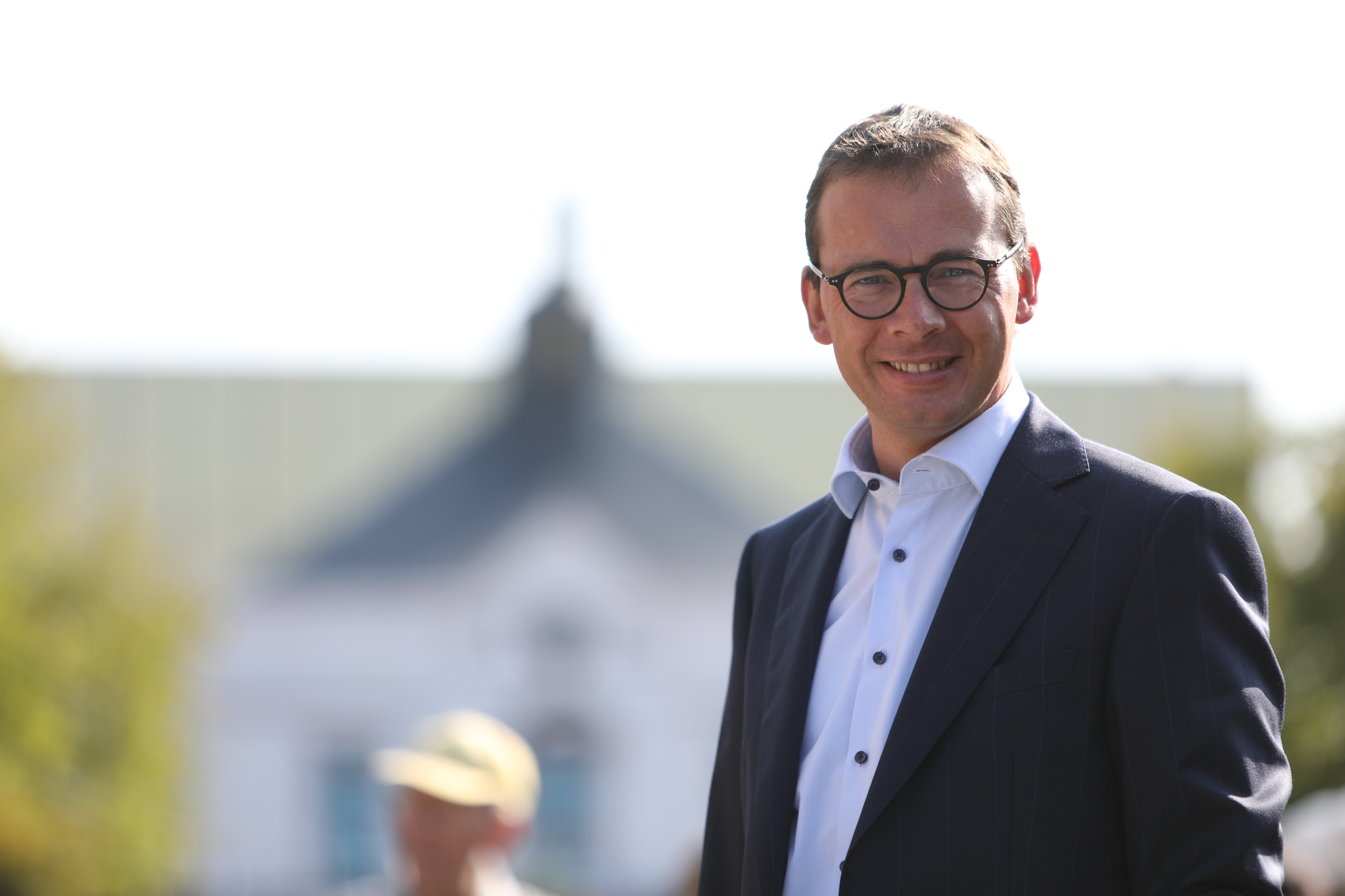 Wouter Beke, voorzitter CD&V